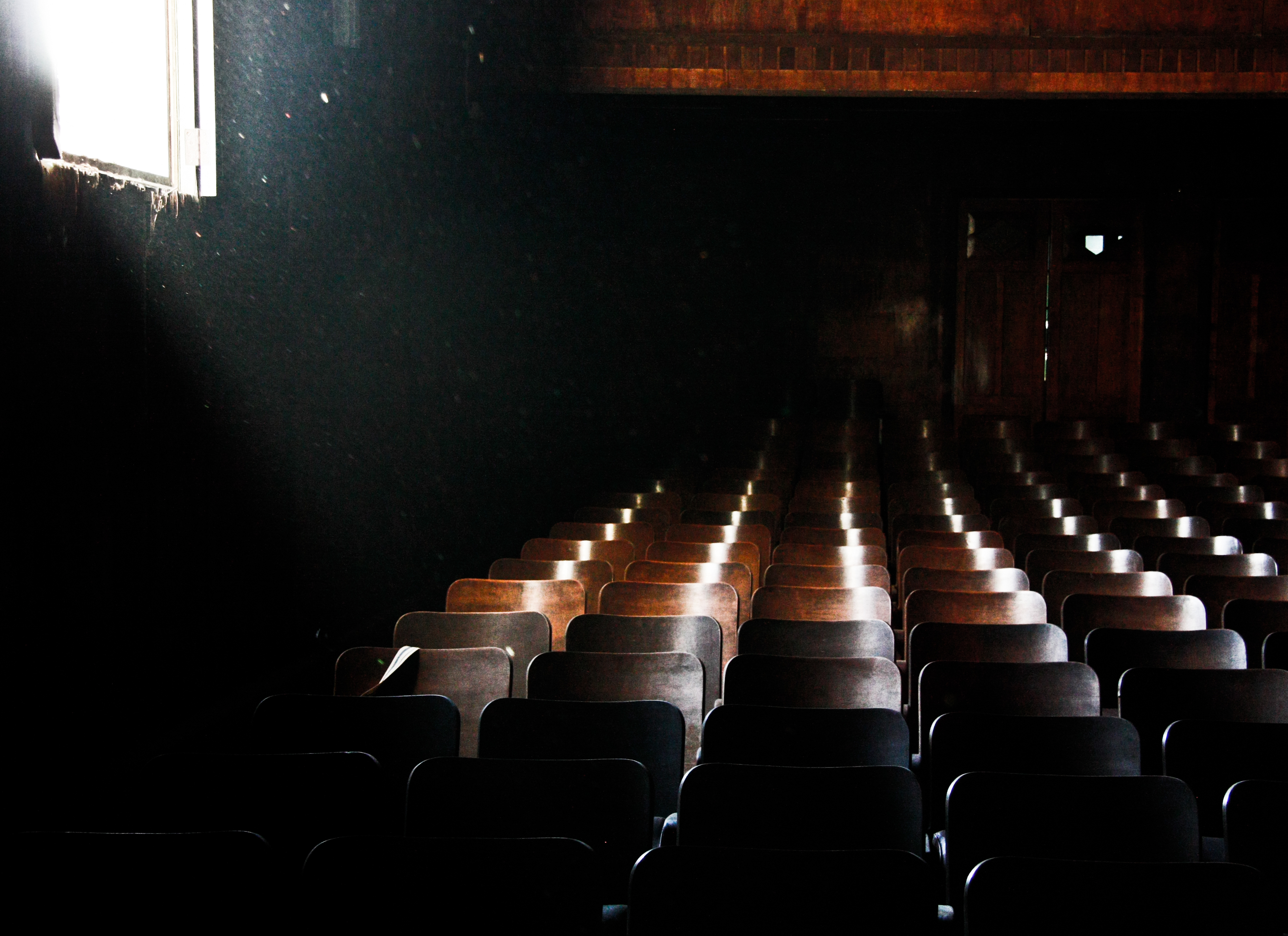 Teatro Galia This is a photo of a national monument in Chile: 2233